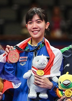 Panipak Wongpattanakit at the 2018 Asian Games